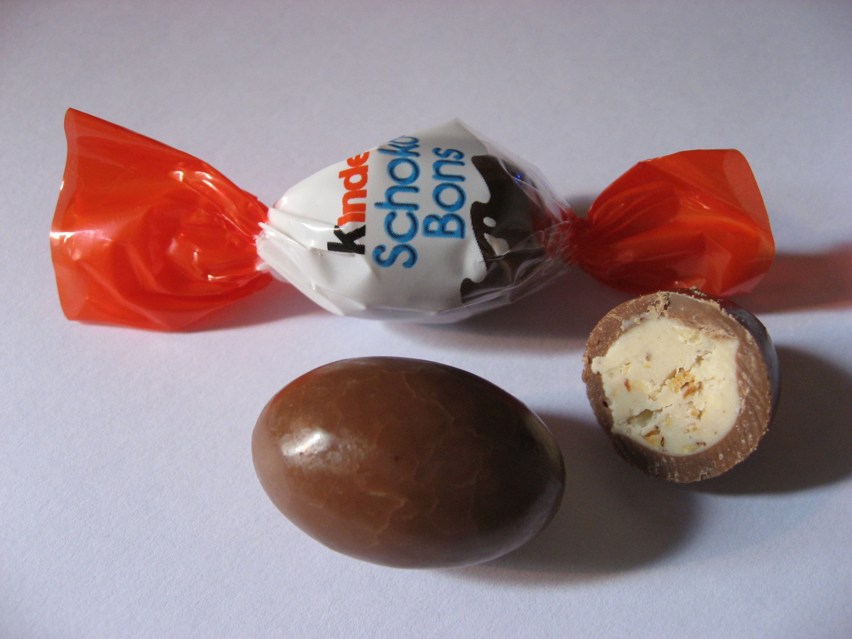 Kinder Schoko-bons, oeufs en chocolat fourrés au lait et aux éclats de noisettes.